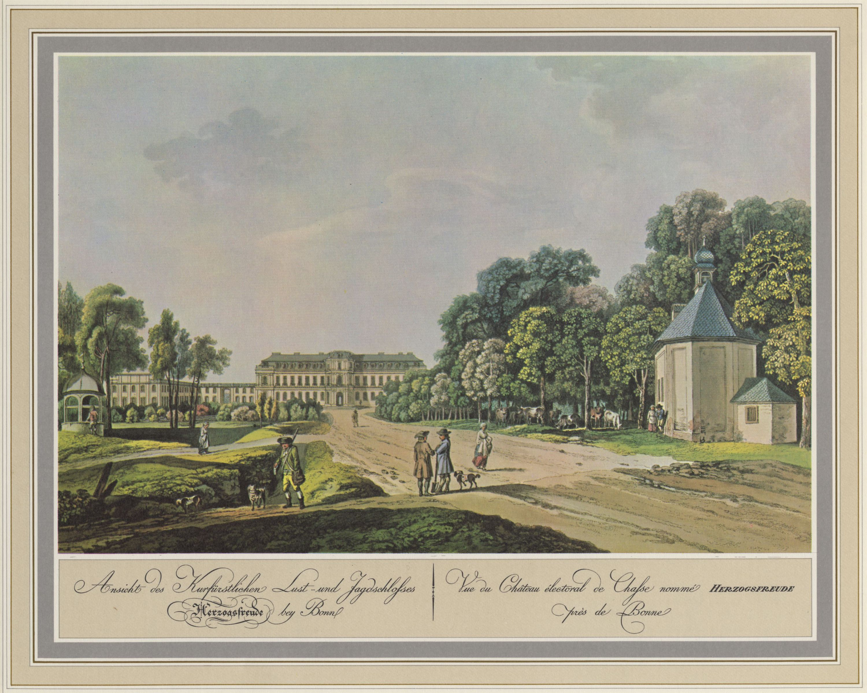 Schloss Herzogsfreude, llustration aus: »Fünfzig malerische Ansichten Rhein-Stroms von Speyer bis Düsseldorf«, erschienen bei Artaria in Wien 1798; nach Aquarellen von Laurenz Janscha, die im Sommer 1792 entstanden